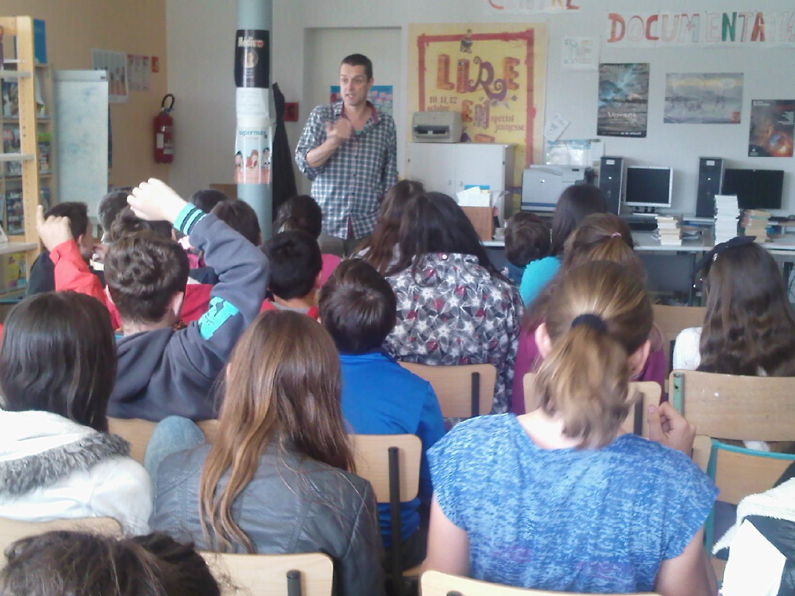 Marc Cantin durant une rencontre scolaire